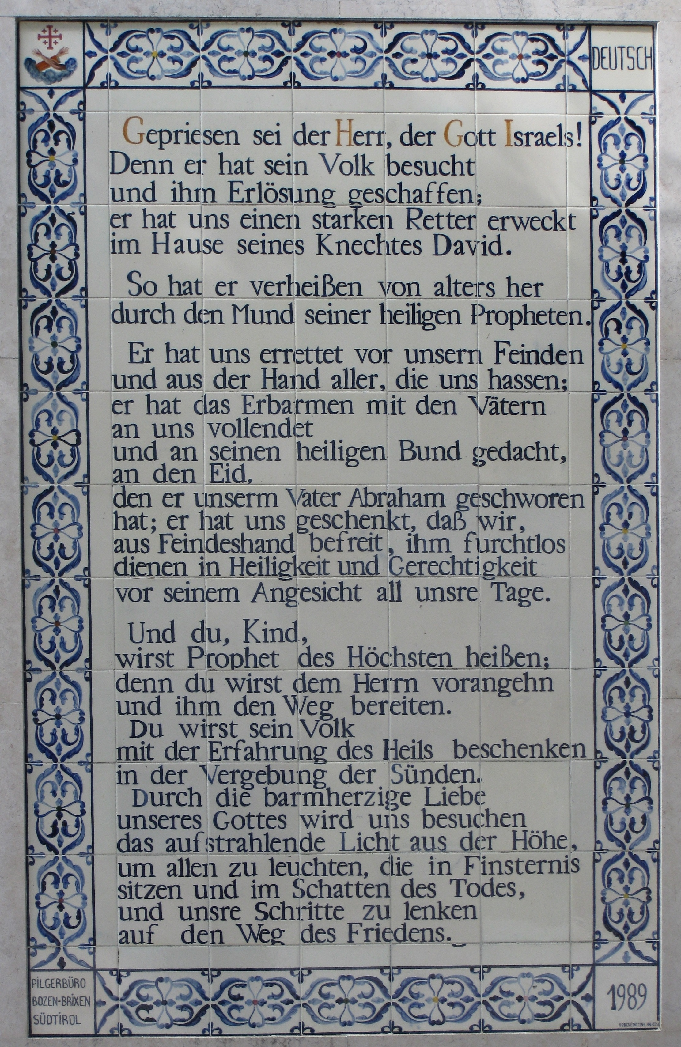 Deutschsprachige Benedictustafel in der Johannes-der-Täufer-Kirche in En Kerem (Jerusalem)